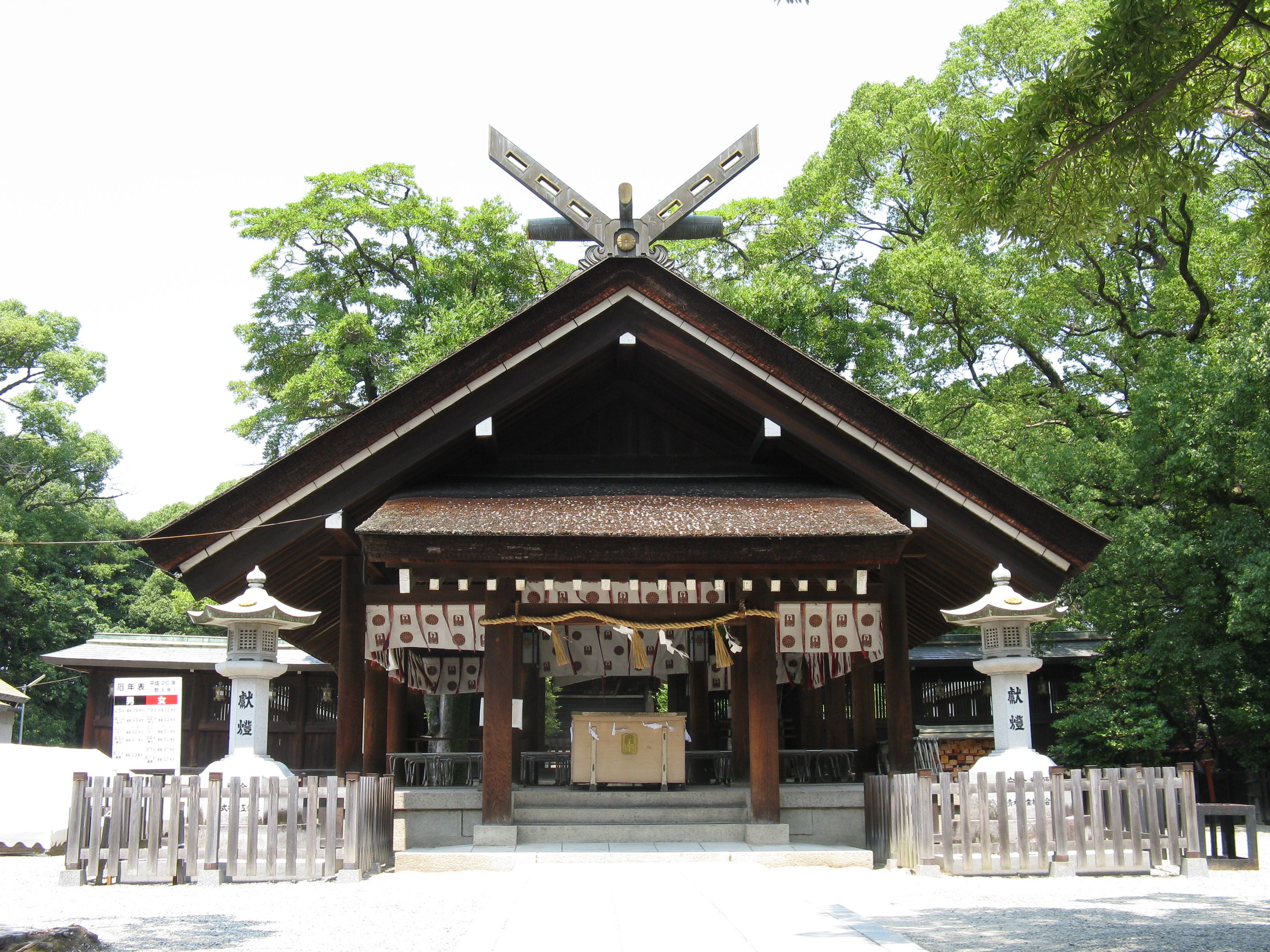 大鳥大社 拝殿